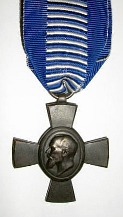 König Ludwig-Kreuz (Königreich Bayern), Vorderseite